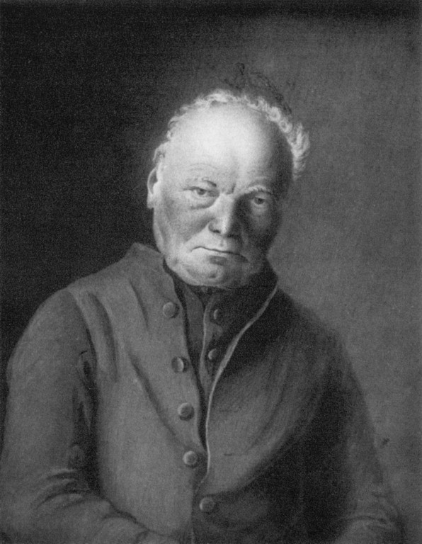 watercolor from 1807 of Johann Peter Heuser